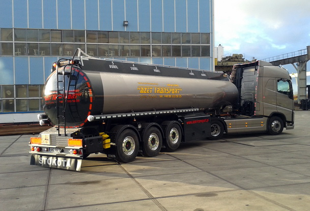 Полуприцеп-цистерна для транспортировки светлых нефтепродуктов